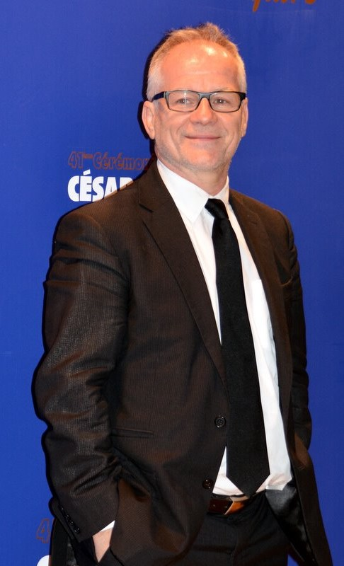 Thierry Frémaux à la cérémonie des César